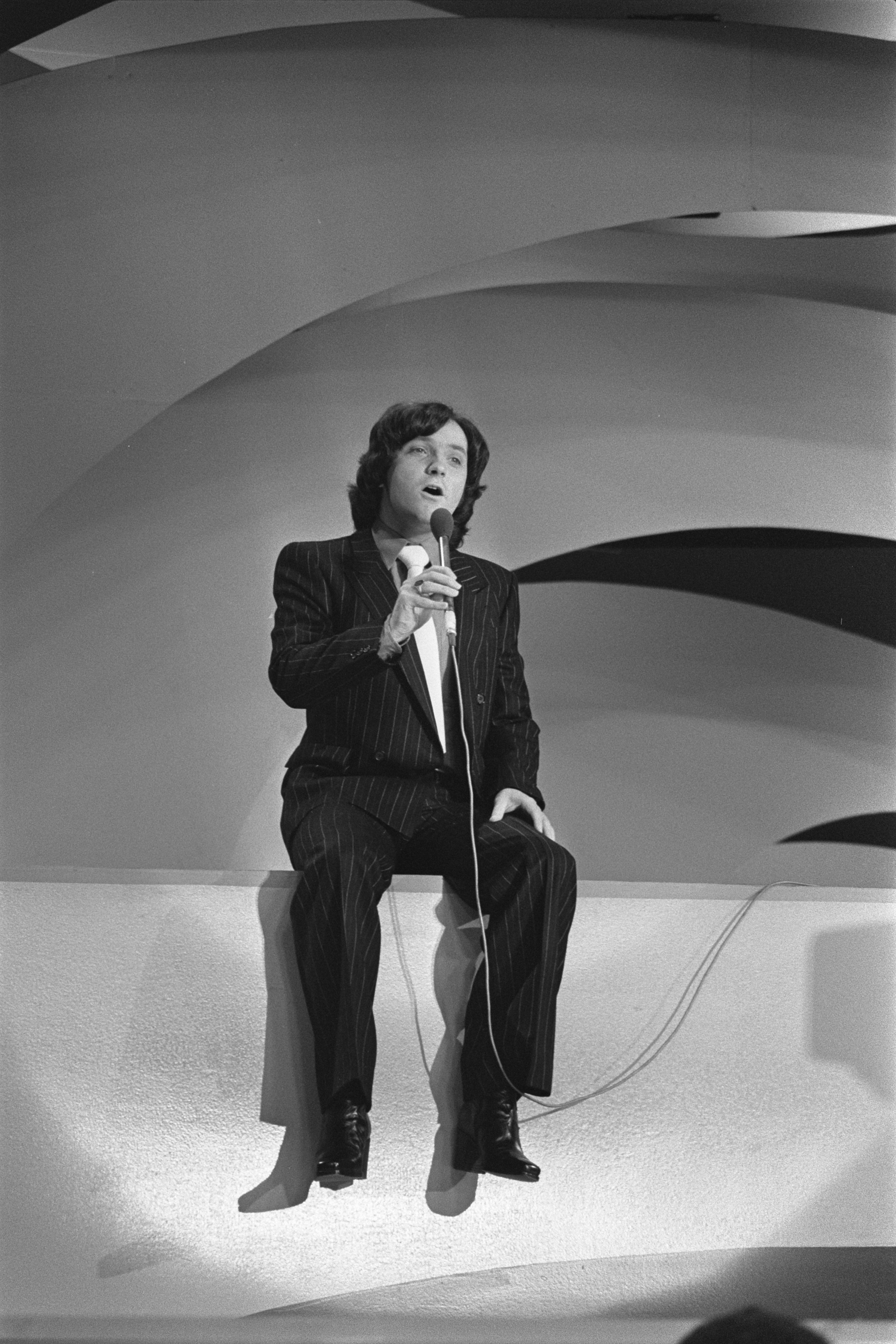 Collectie / Archief : Fotocollectie Anefo Reportage / Serie : [ onbekend ] Beschrijving : Songfestival; Peter Cook Datum : 2 februari 1977 Trefwoorden : Songfestivals Fotograaf : Suyk, Koen / Anefo Auteursrechthebbende : Nationaal Archief Materiaalsoort : Negatief (zwart/wit) Nummer archiefinventaris : bekijk toegang 2.24.01.05 Bestanddeelnummer : 929-0094